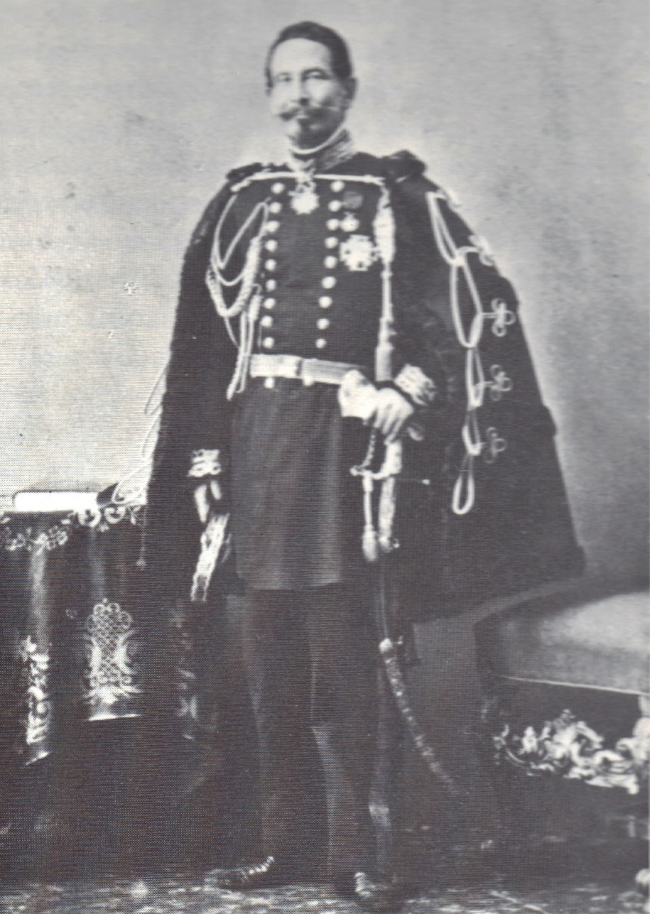 Il Cav. Don Giovanni Polizzy (1787-1869), maggior generale del Regno d'Italia nel 1862, già tenente generale del Regno delle Due Sicilie